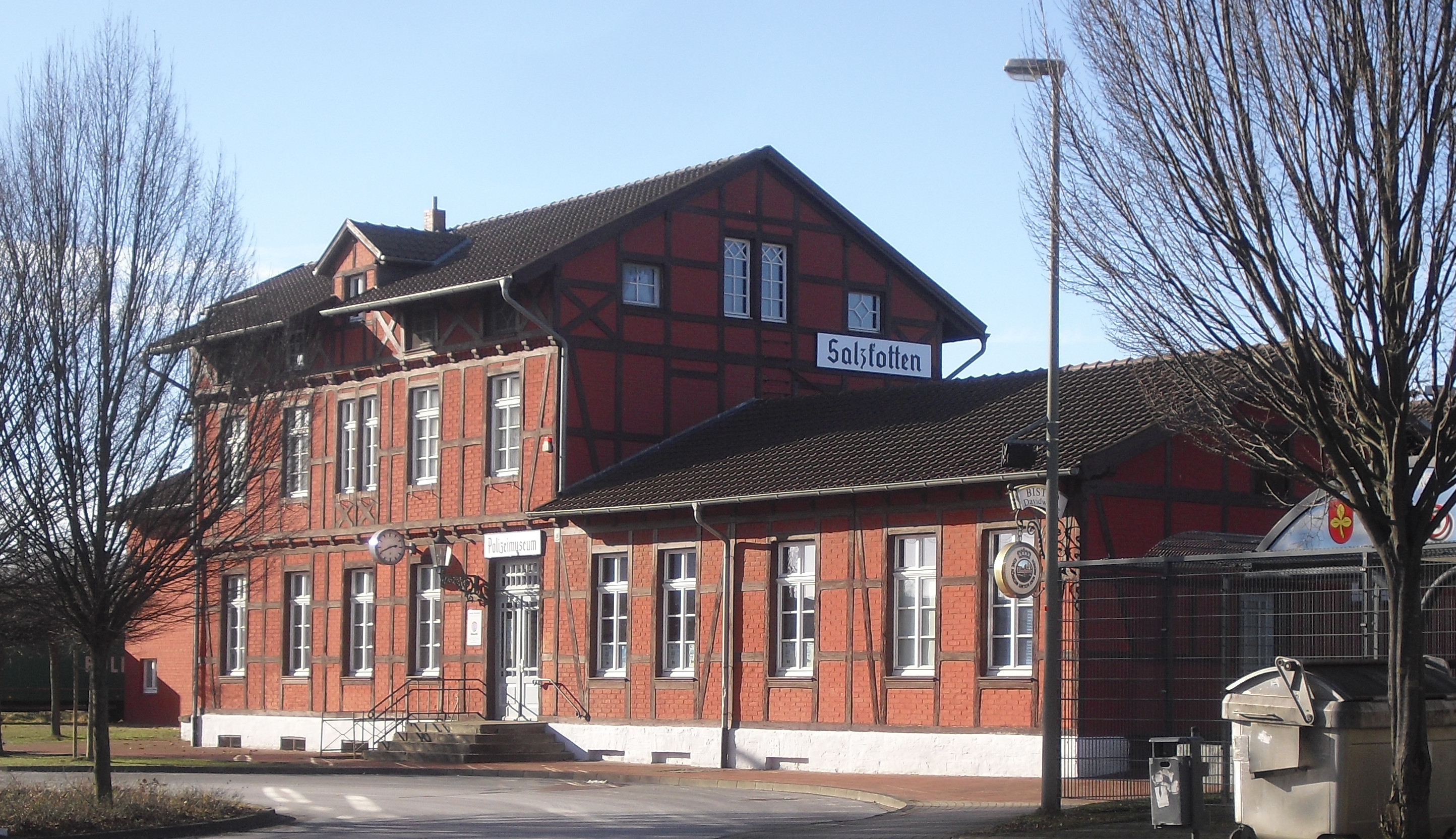 Bahnhof Salzkotten (Polizeimuseum) This is a photograph of an architectural monument.